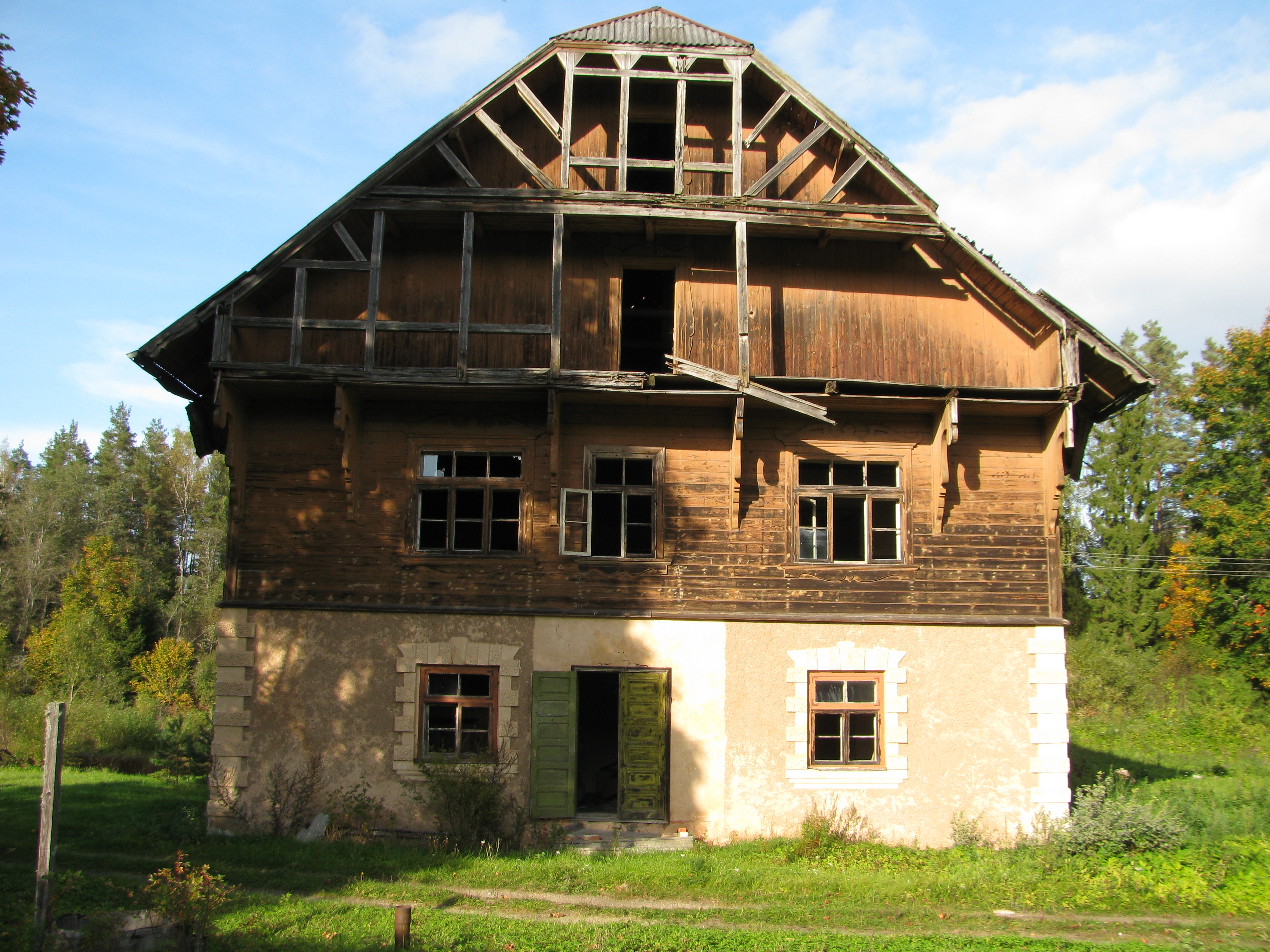 Jaunlaicenes muižas medību pils, Apes pagasts